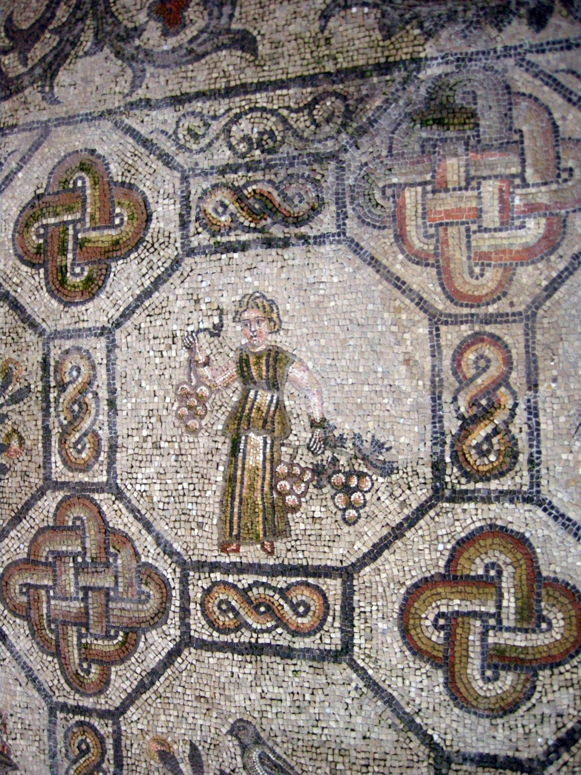 Basilica di aquilieia, mosaici, birds carpet